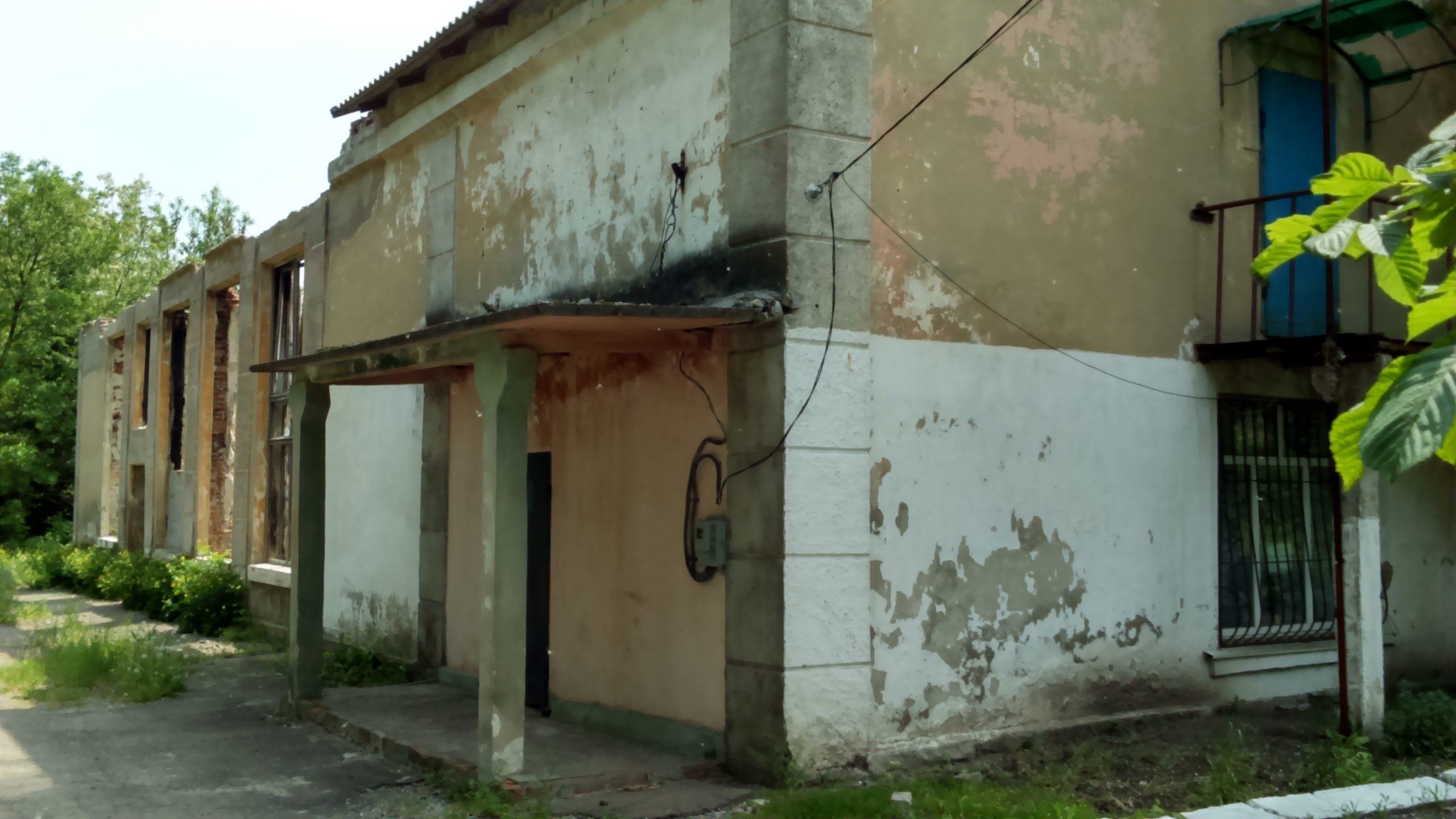 Бібліотека в селищі Новому Донбасі